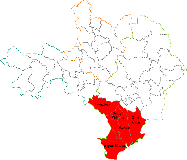 Deuxième circonscription législative du département du Gard